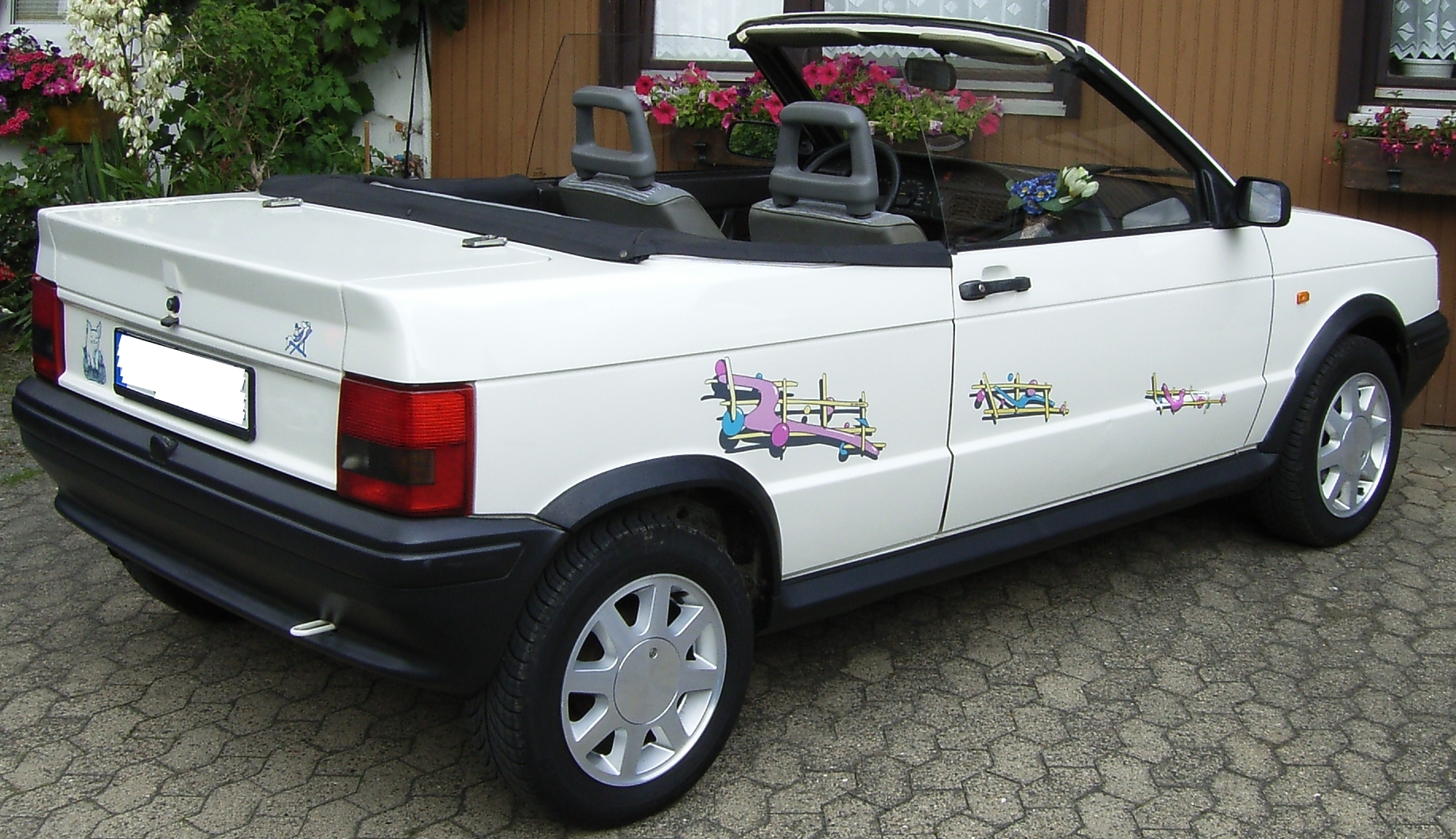 Seat Ibiza 021A Cabrioumbau durch Firma Bieber Cabriolet Borken Bauj. 1993 HU/AU 07/2017